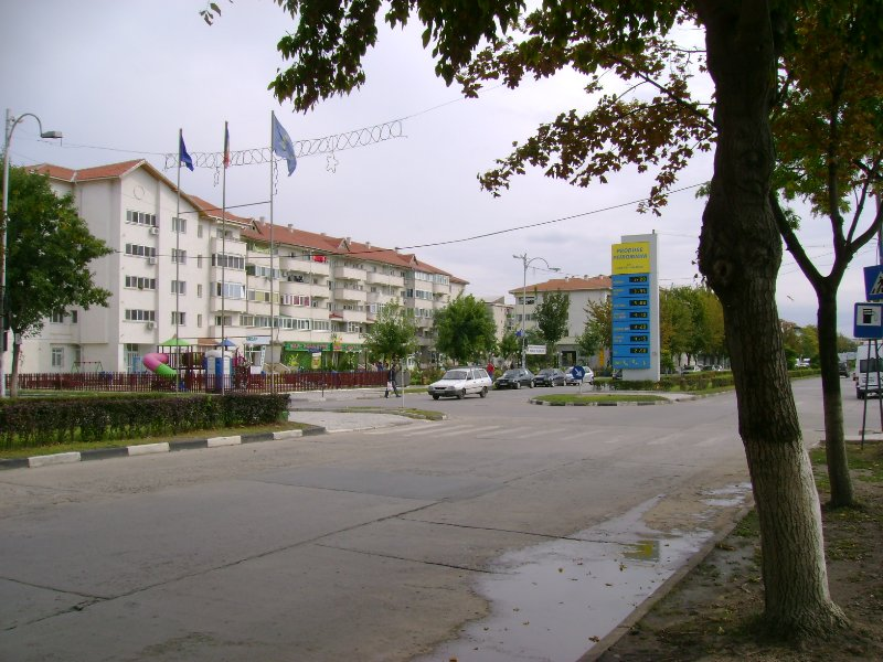 str Prelungirea Bucuresti-Calarasi